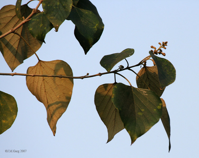 Gamhar or Kashmir Teak Gmelina arborea in Kolkata, West Bengal, India.